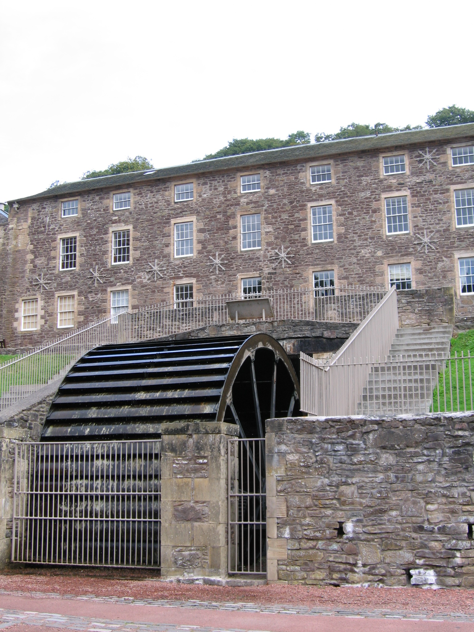 New Lanark waterwheel